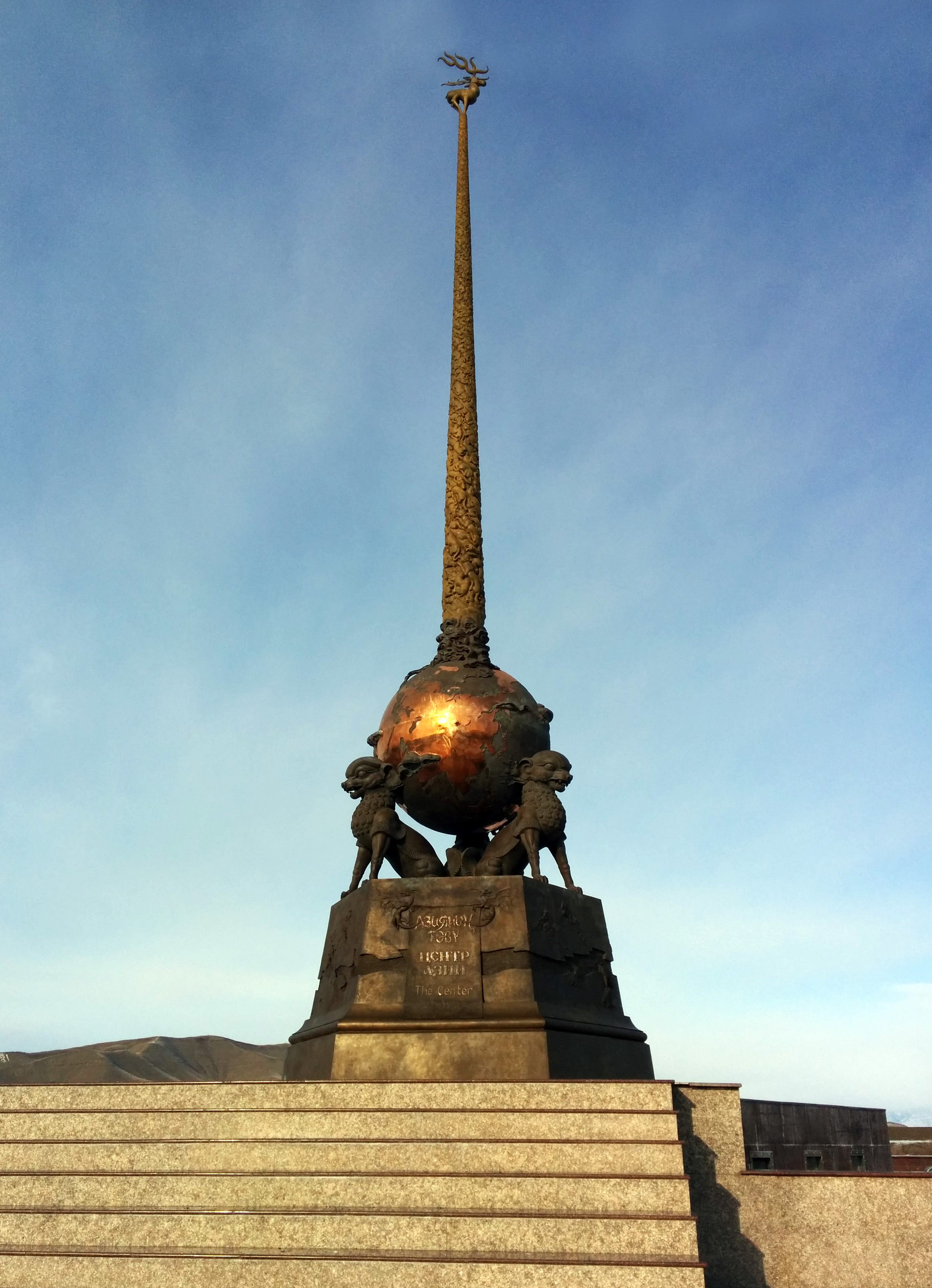 Тыва дыл: 2014 чылда чаарткан Азий Диптиң Төвүн демдеглээн демдек (обелиск). 2014 чылда "Кызыл хоорайның 100-чыл ою" дээш эрги турган обелискти солуп салган.